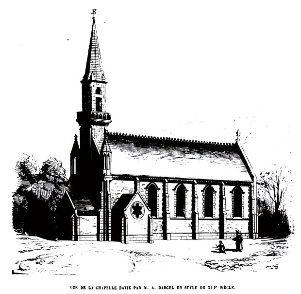 Dessin de la chapelle Notre-Dame de Montmélian (construite entre 1856 et 1864; démolie en 1978) par son architecte, Alfred Darcel.